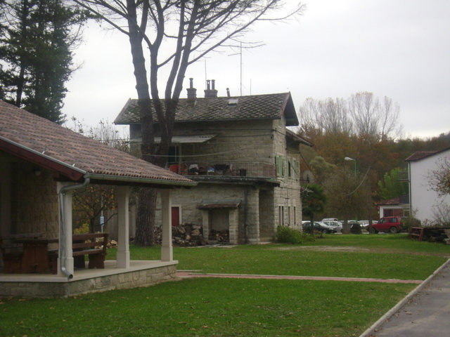 Kolodvor u Livadama na trasi "Parenzane"